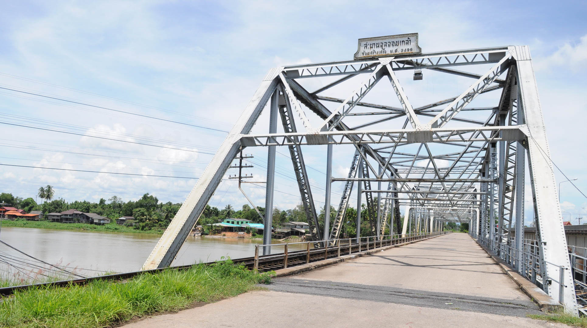 สะพานจุลจอมเกล้าปัจจุบัน